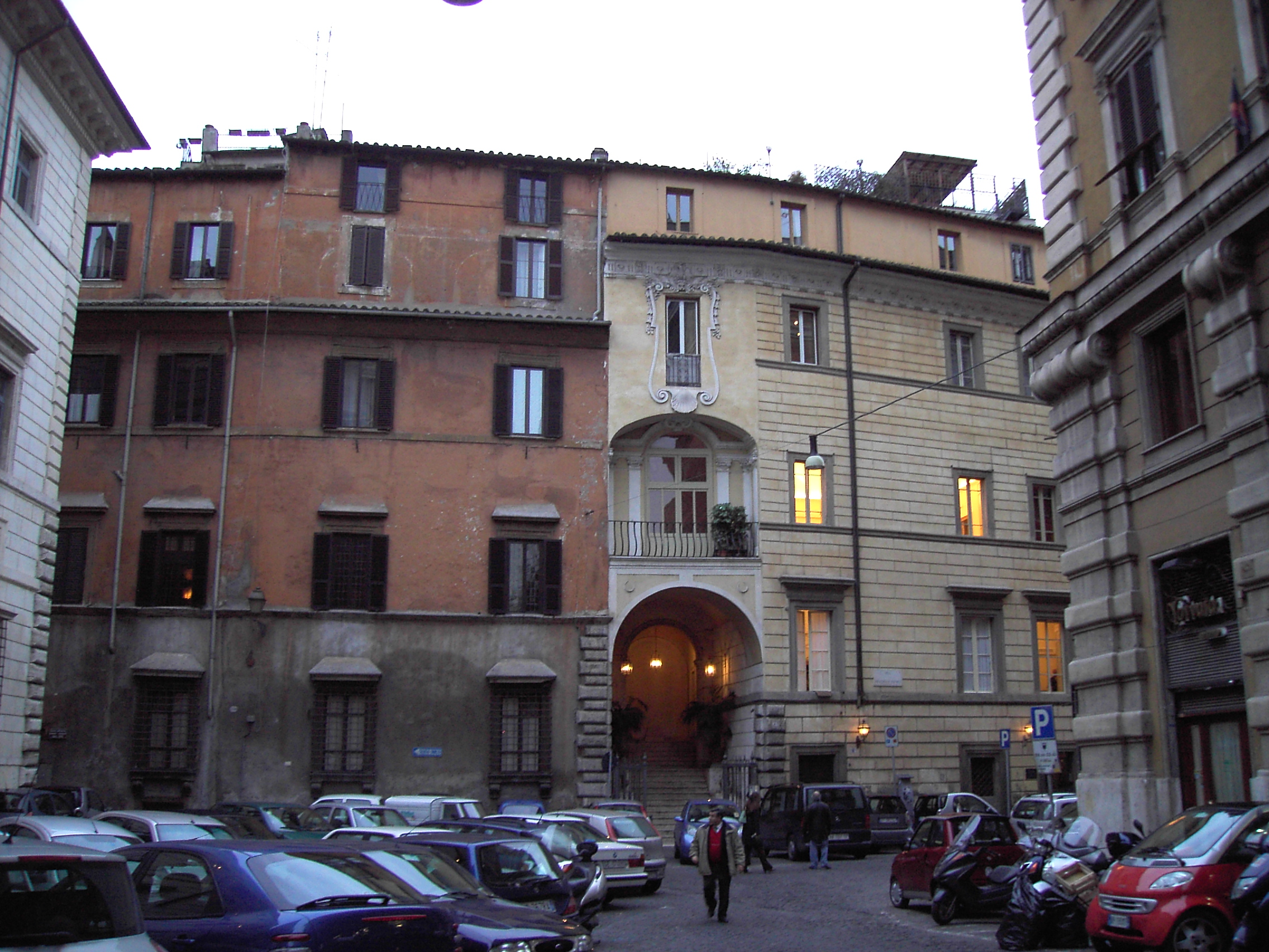 Roma, piazza Cenci. palazzi Cenci-Taviani